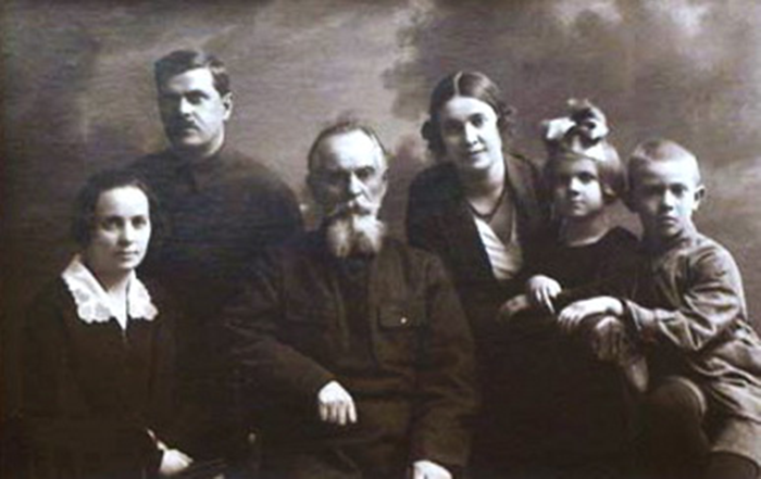 Сям’я Уладзіміра Караткевіча: цётка Яўгенія Васілеўна, бацька Сямён Цімафеевіч, дзед Васіль Юллянавіч Грынкевіч, сястра Наталля і брат Валерый. 1928 г. Беларуская (тарашкевіца): Сям’я Ўладзімера Караткевіча: цётка Яўгенія Васілеўна, бацька Сямён Цімафеевіч, дзед Васіль Юльлянавіч Грынкевіч, сястра Натальля і брат Валер.